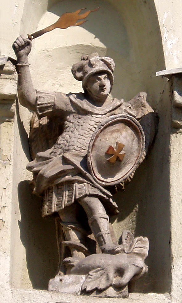 Скульптура на будинку, що на вулиці Галицькій, 20 у Львові.